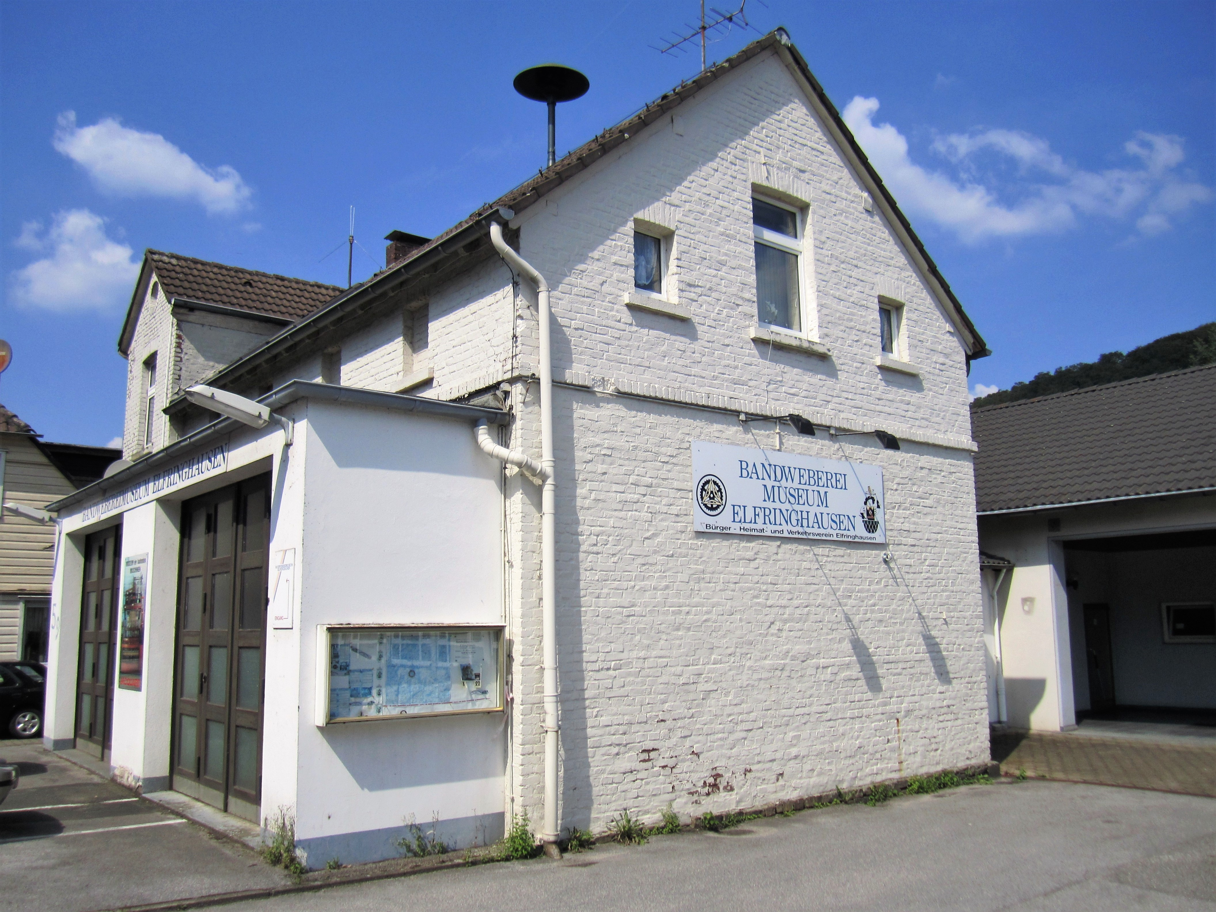 Bandwebereimuseum Elfringhausen im Hattinger Ortsteil Oberelfringhausen, Felderbachstraße 59. Das 1996 eröffnete Museum wurde von Mitgliedern (unter ihnen viele ehemalige Hausbandweber) des Bürger-, Heimat- und Verkehrsverein Elfringhausen und Umgebung e.V. eingerichtet. Es befindet sich in dem Gebäude der 1821 erbauten ehemaligen Schule. Im vorderen zweitorigen Anbau befand sich bis zu ihrem Neubau das Feuerwehr-Gerätehaus. Rechts angebaut die 1962 errichtete neue Schule (1968 aufgelöst) und das ehemalige Gemeindezentrum.